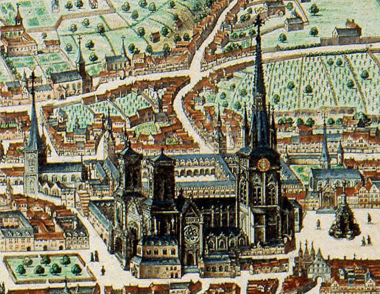 Carte de Liège de Blaeu : Cathédrale Saint Lambert de Liège, Détail